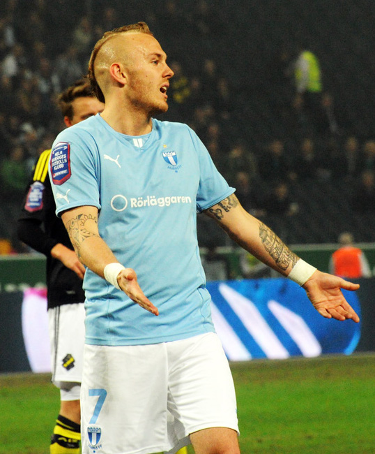 Magnus Eriksson